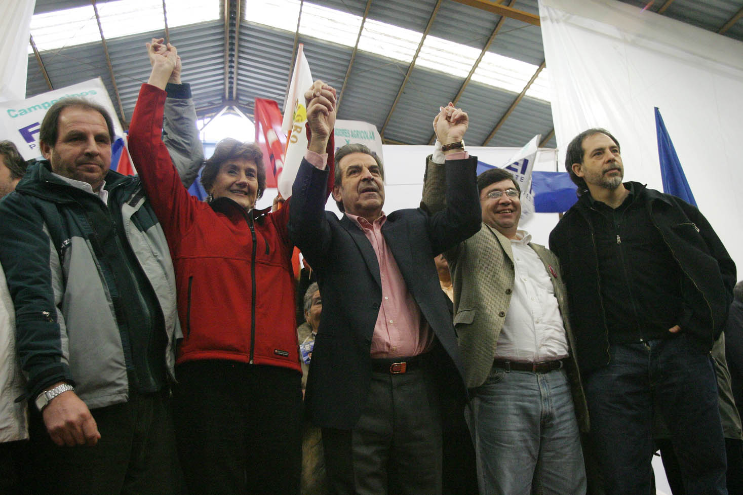 Eduardo Frei en Isla de Maipo